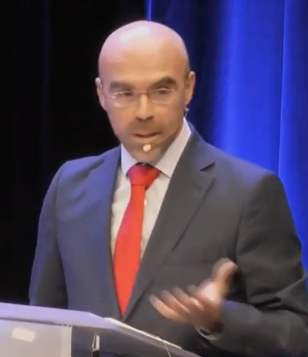 Jorge Buxadé